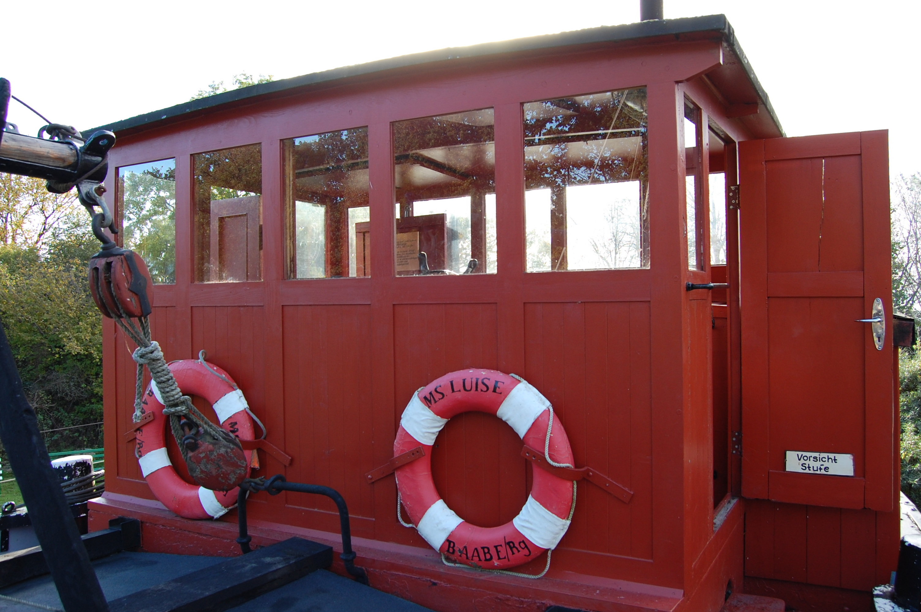 Ruderhaus des Museumsschiffs Luise in Göhren